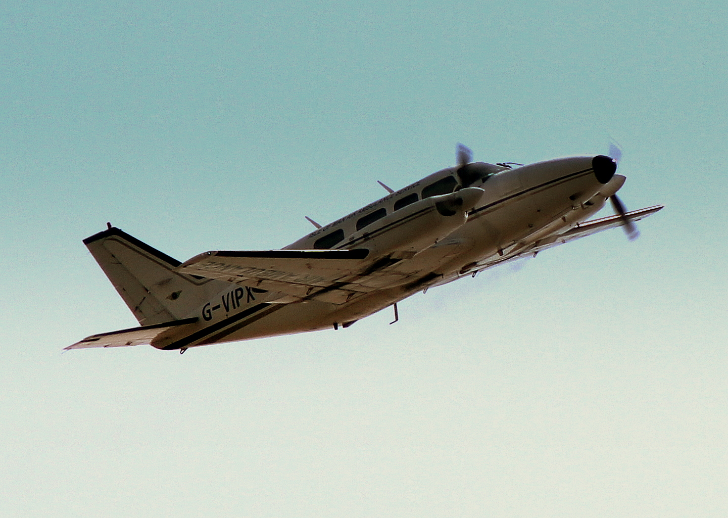 ISLE OF MAN AIR AMBULANCE SERVICE